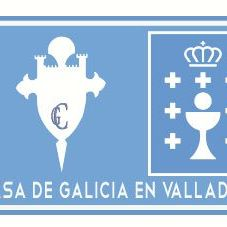 Imaxe representativa da Casa de Galicia de Valladolid